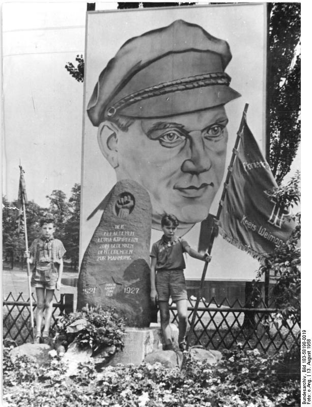 Leuna, Denkmal der Märzgefallenen, Pioniere Zentralbild Sonderred.Halle 13.8.1958 III. Pioniertreffen in Halle Junge Pioniere aus dem Bezik Erfurt nutzen ihren Ruhetag Der vierte Tag, der 13.8.58, des Friedensmarsches der Thälmann-Pioniere nach Halle war für die jungen Festteilnehmer vieler Bezirke Ruhetag. Diesen benuzten die Pioniere des Bezirkes Erfurt, die ihre Quartiere in Frankenleben, Kreis Merseburg, bezogen hatten, das volkseigene Stahlwerk Frankleben und das Denkmal der gefallenen Märzkämpfer von Launa-Kröllwitz zu besichtigen. UBz: Zwei Pioniere des Kreises Weimar-Land halten Ehrenwacht am Denkmal auf dem Gänseanger von Leuna-Kröllwitz.